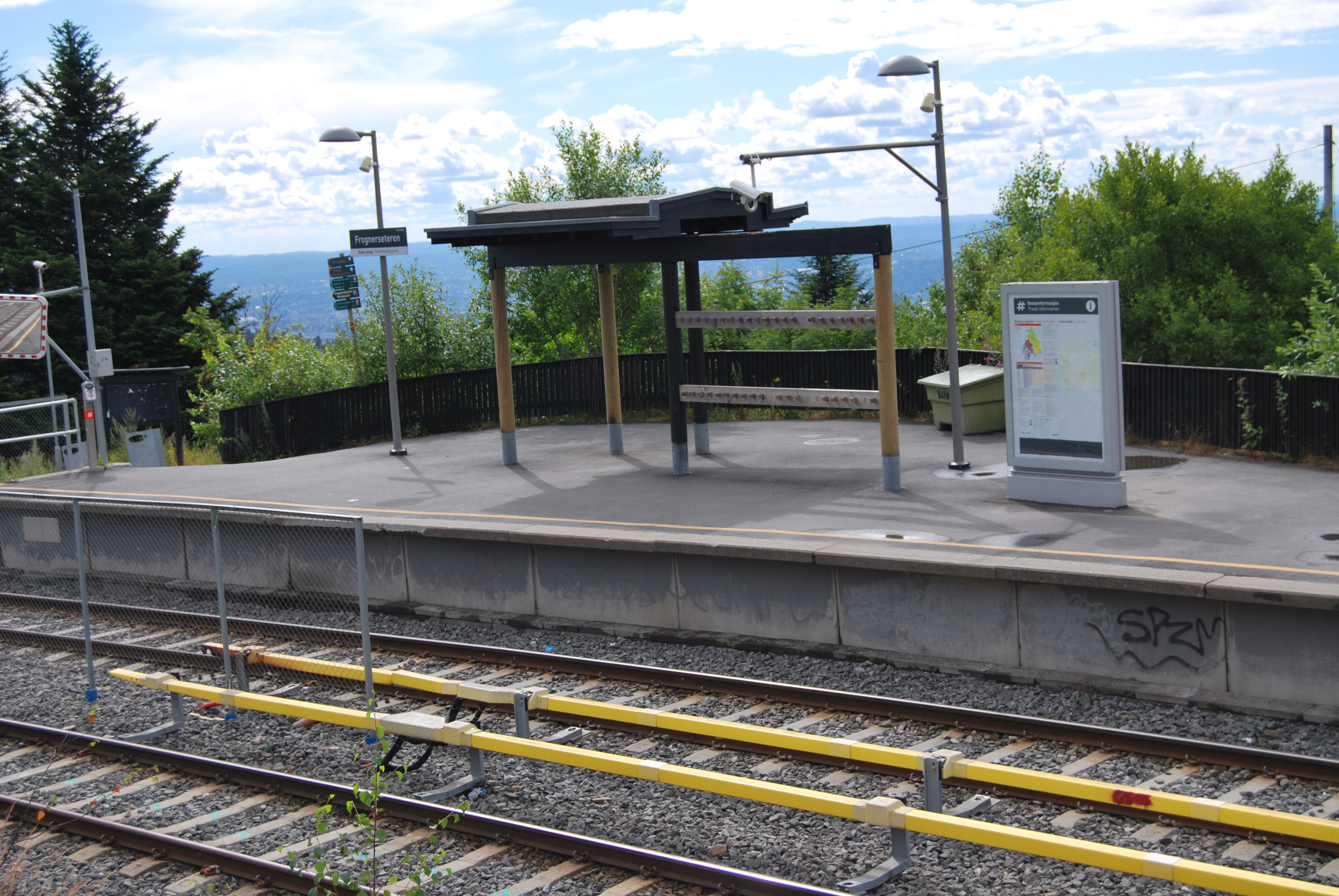 Frognerseteren, stscja. 2013